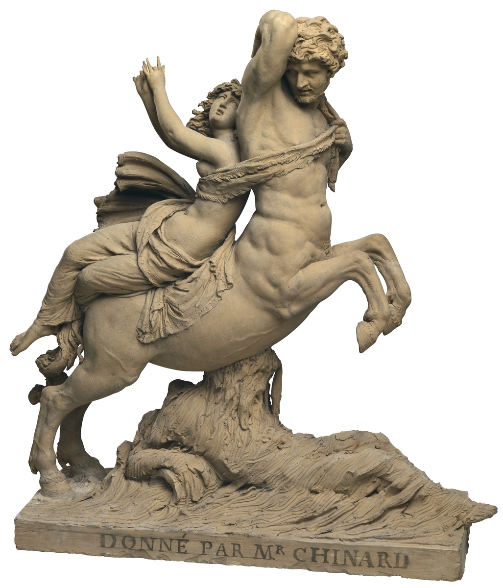 Statuette